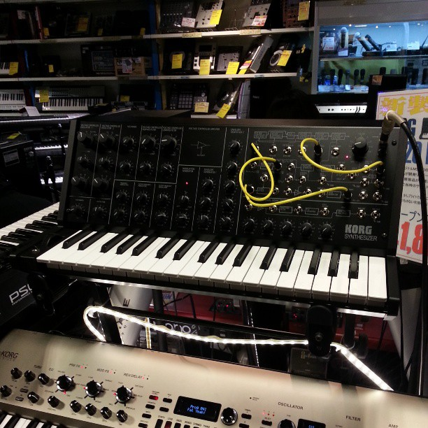 KORG MS-20 mini & KingKORG @ Ishibashi Music, Shibuya, 2013-04-13